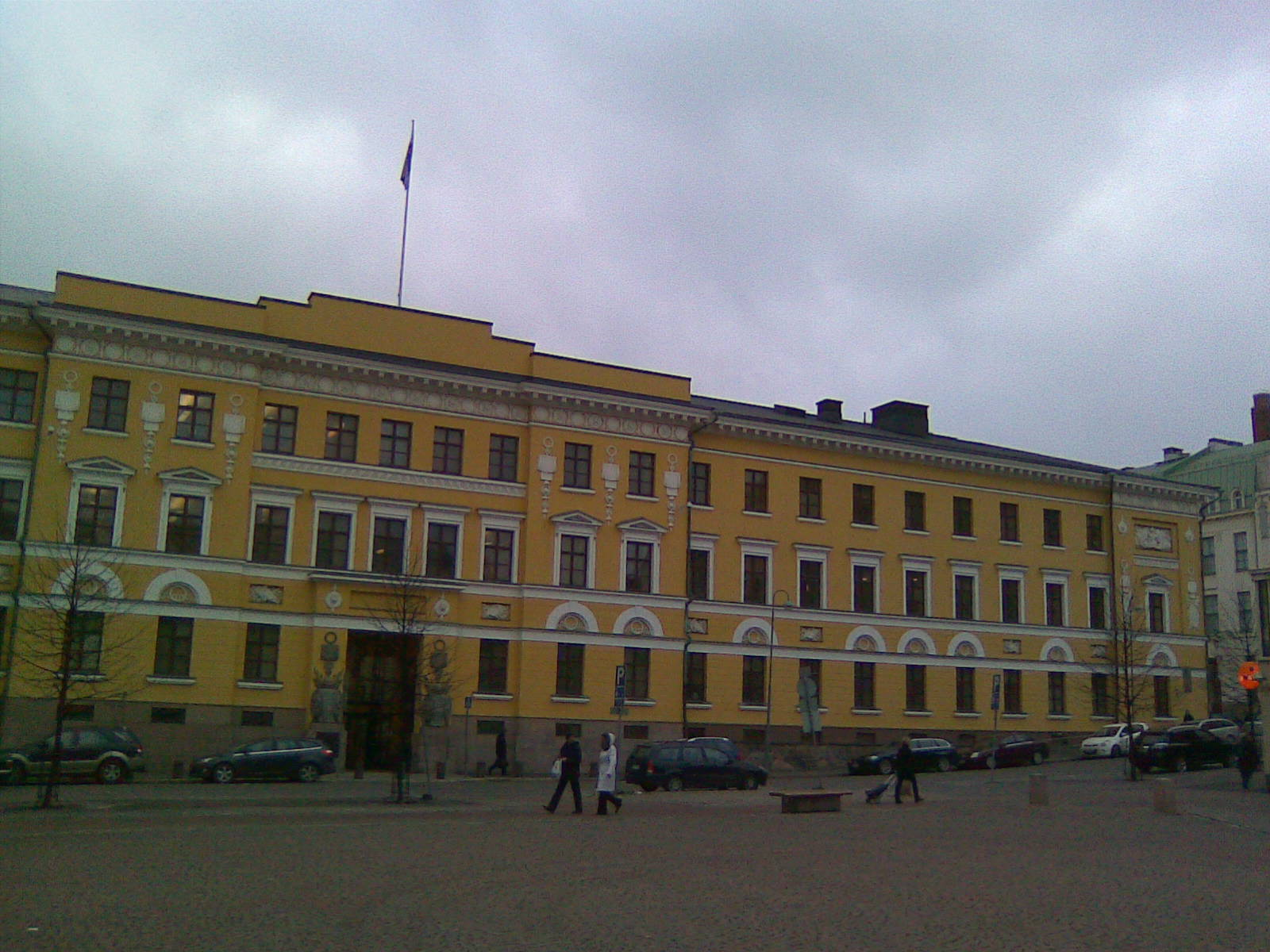 Suomen puolustusministeriön päärakennus Kasarmitorilla Helsingissä.